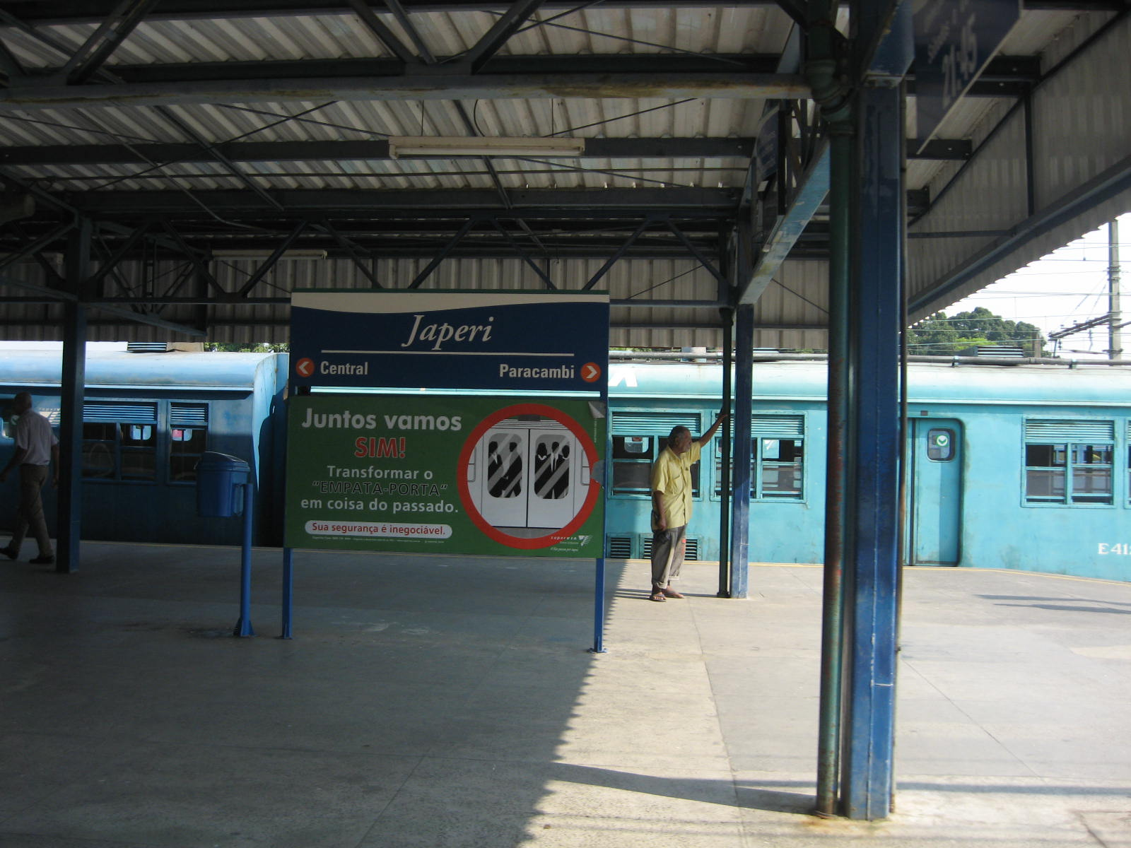 Vista da estação de Japeri, na Baixada Fluminense, RJ.